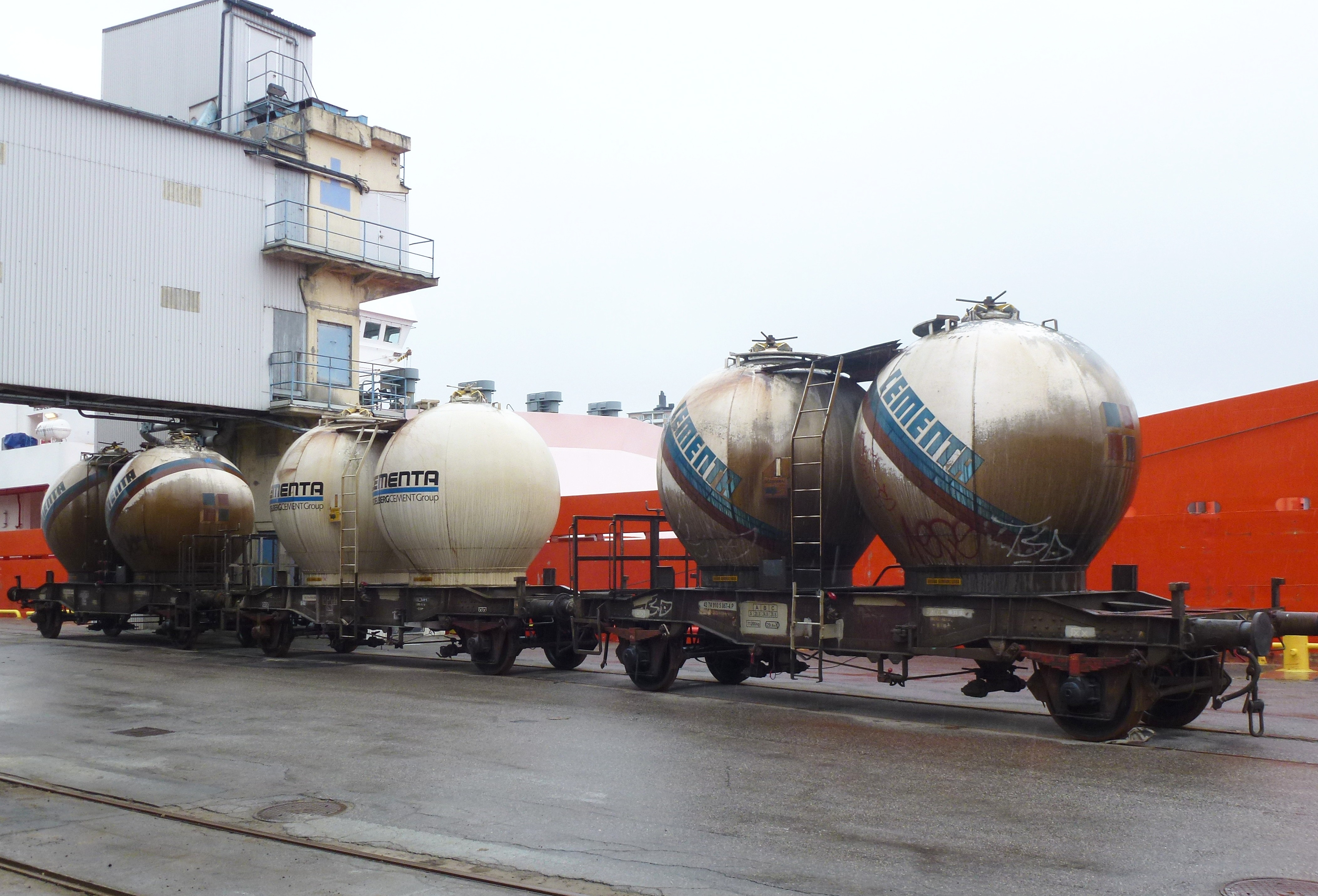 Cementa Liljeholmen, kajen, hamnen, cementtåg